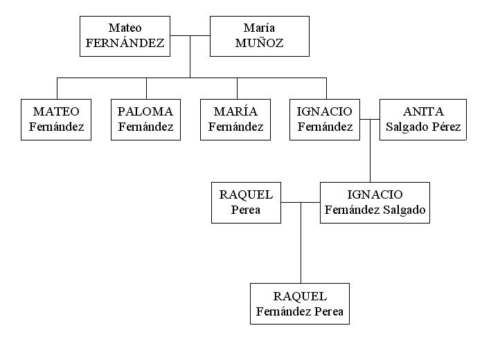 Segundo árbol genealógico de la novela EL CORAZÓN HELADO, de Almudena Grandes: Familia Fernández-Perea